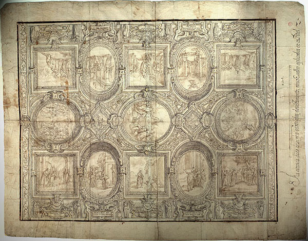 Représentation des éléments présents sur la nef de la chapelle de l'Hospital Real de Todos os Santos